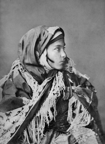 Lakian girl